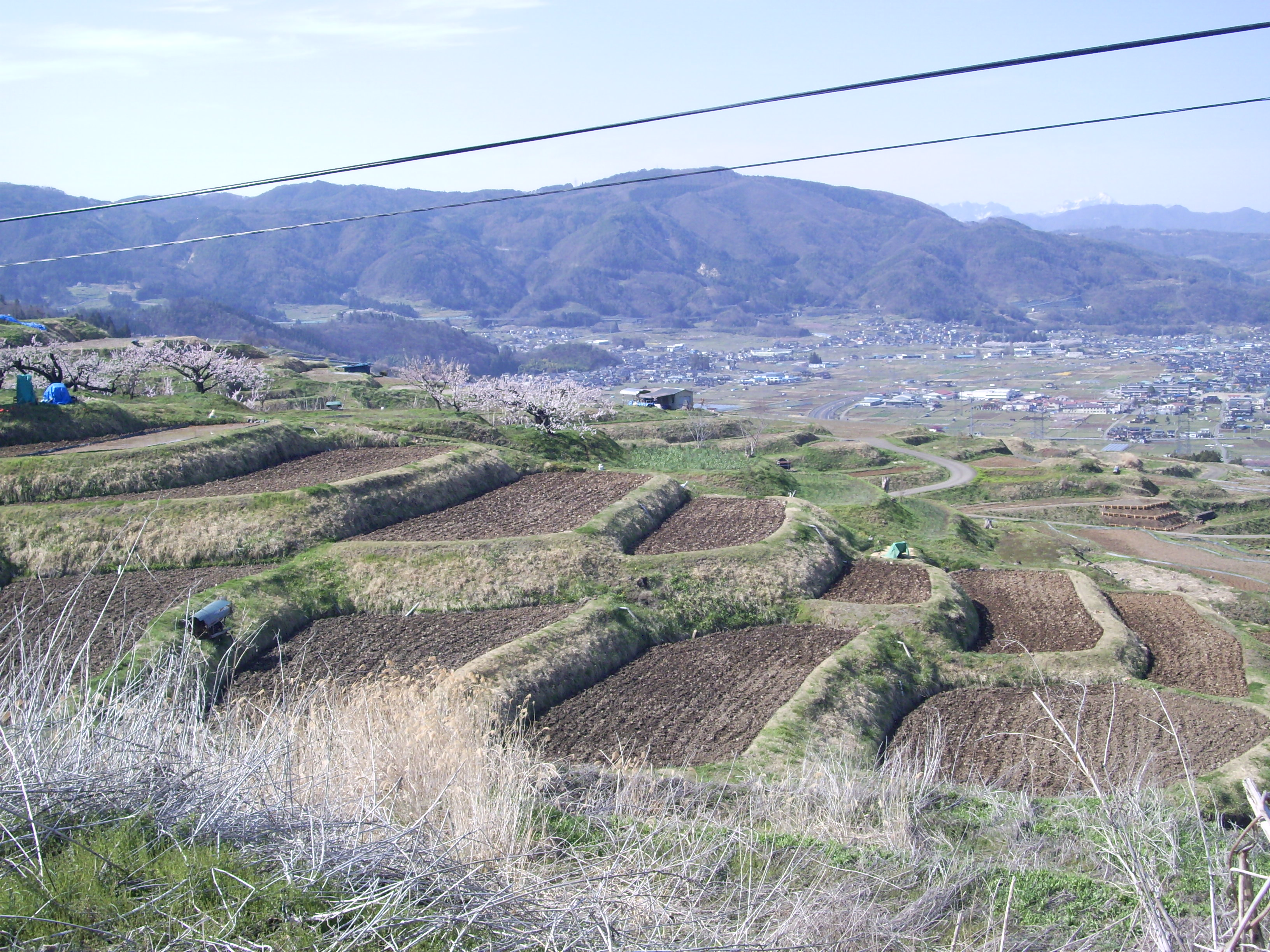 重要文化的景観「姨捨の棚田」ー引水前の状態